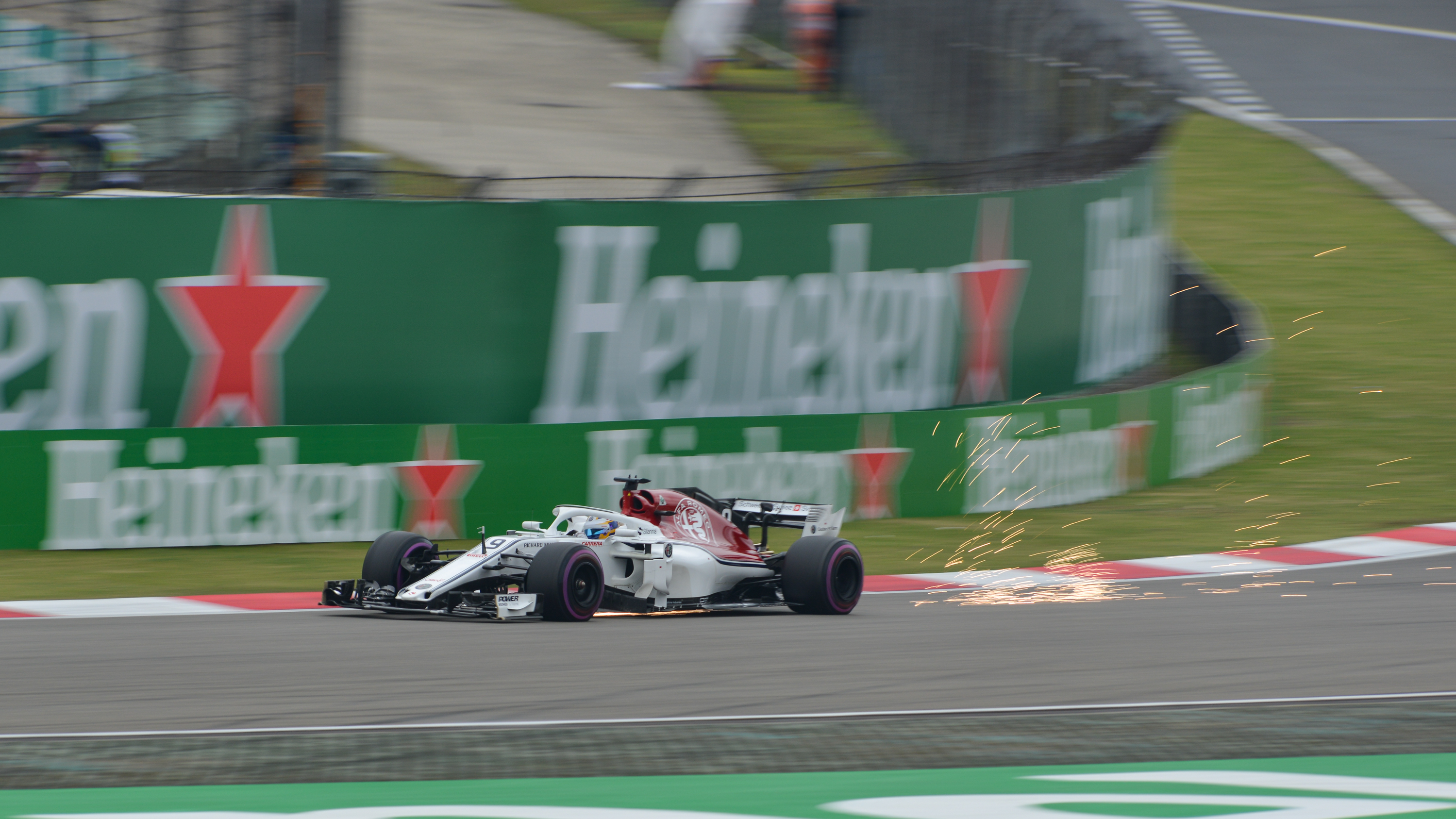 Sauber Ferrari